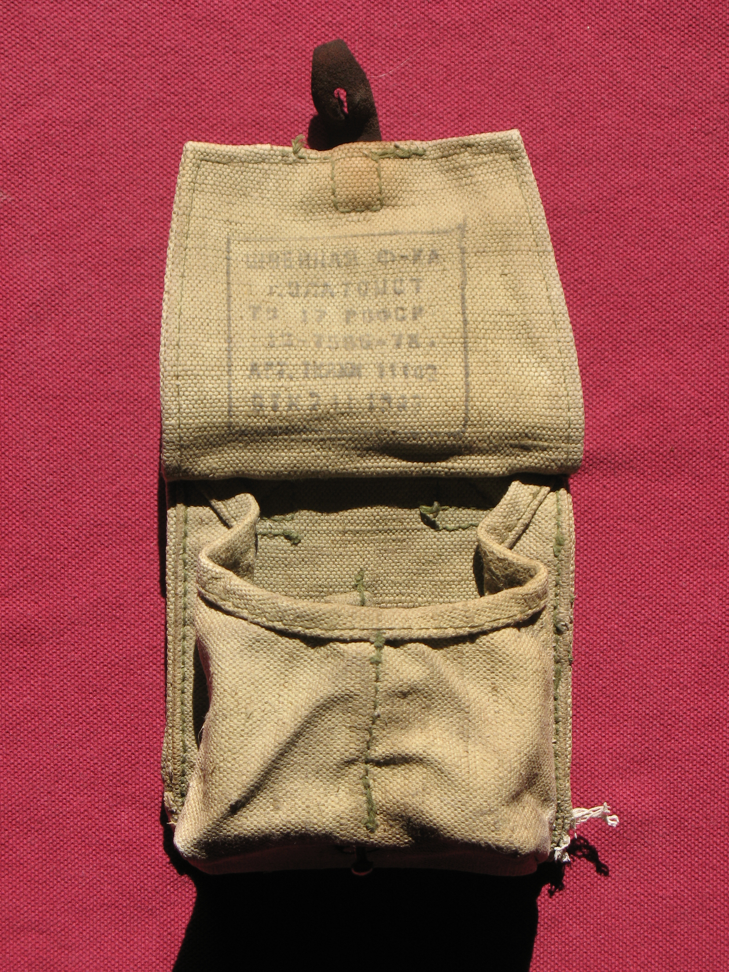 Сумка для ручных гранат, ВС СССР, швейная фабрика города Златоуст, Министерства лёгкой промышленности РСФСР.